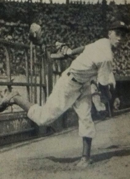 清水宏員